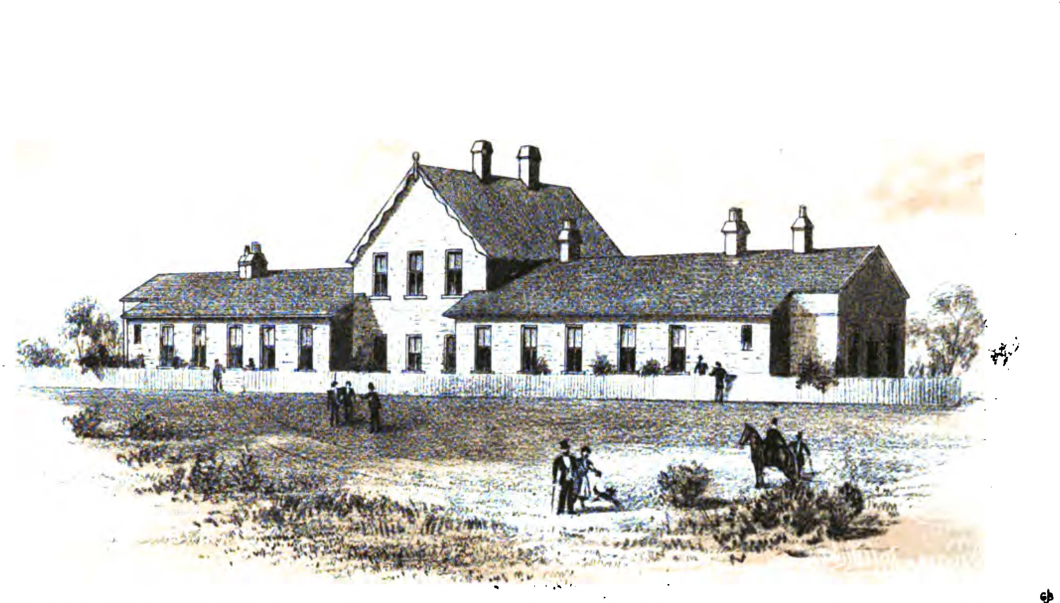 Fever Hospital, Sudbrook